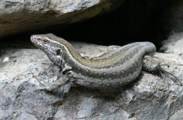 Gallotia caesaris (Lehrs, 1914) subsp. gomerae (Boettger & Müller, 1914).